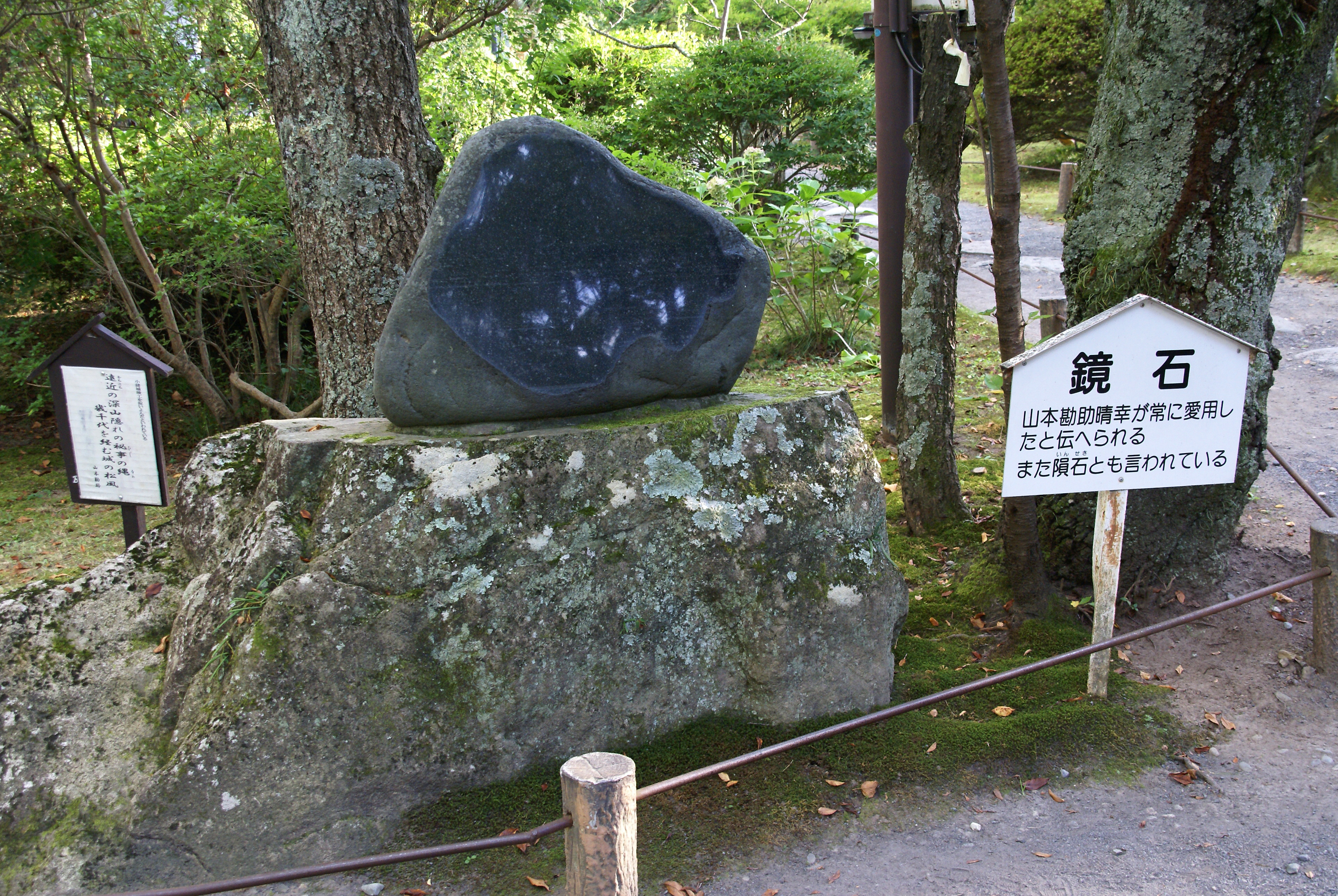 Kaiko-jinja in Komoro, Nagano prefecture, Japan